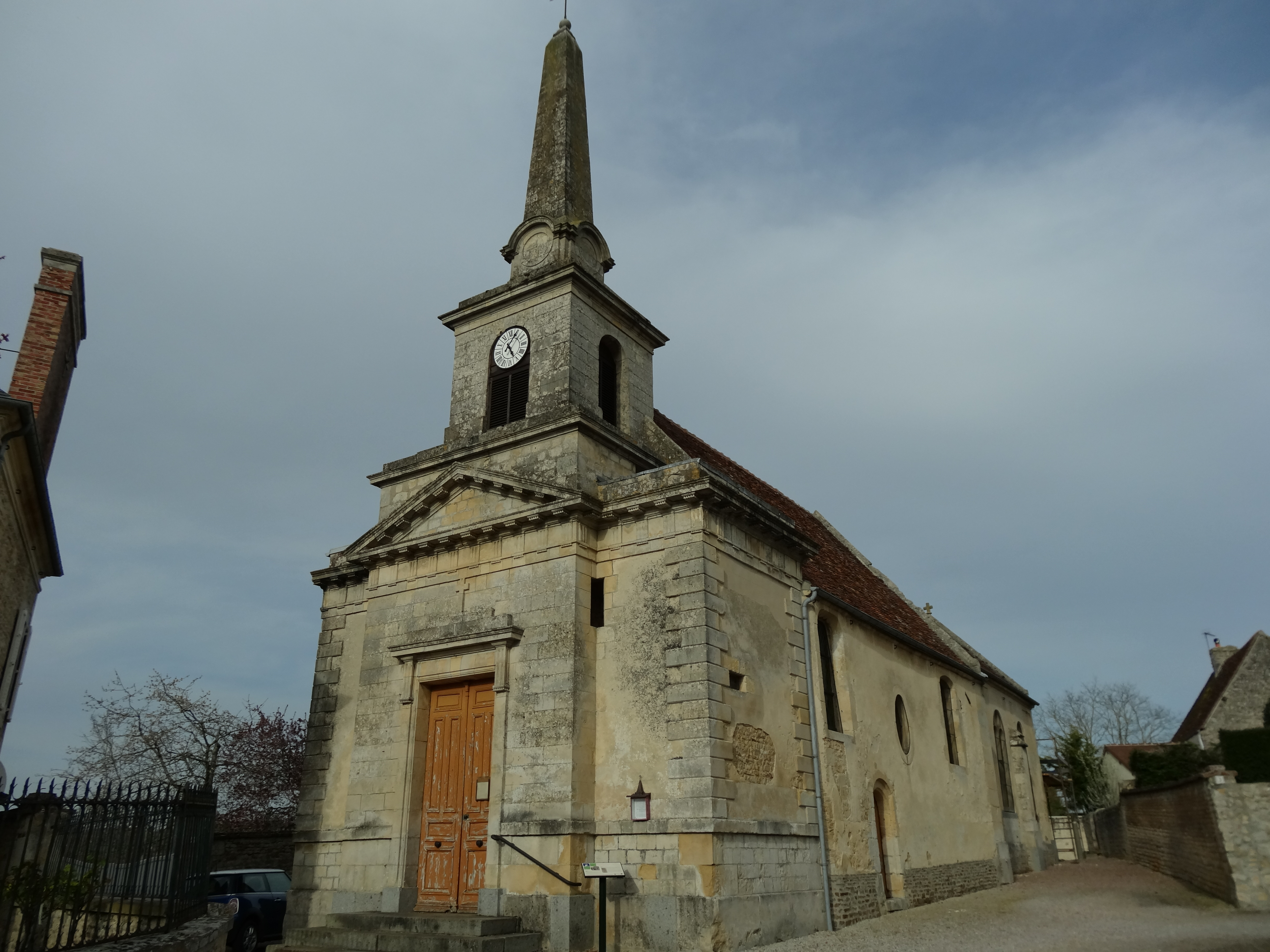 église Saint-Rieul à Eraines